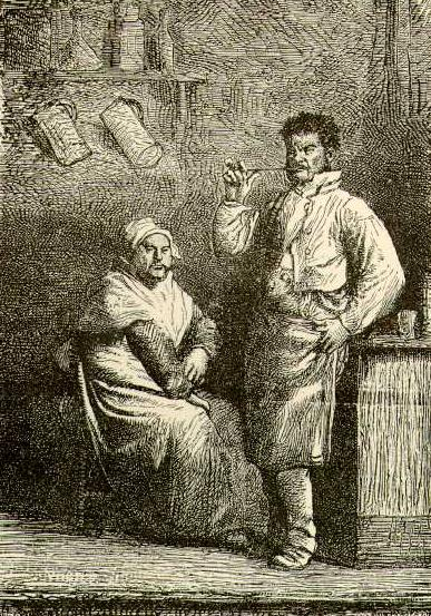 Os Thénardiers